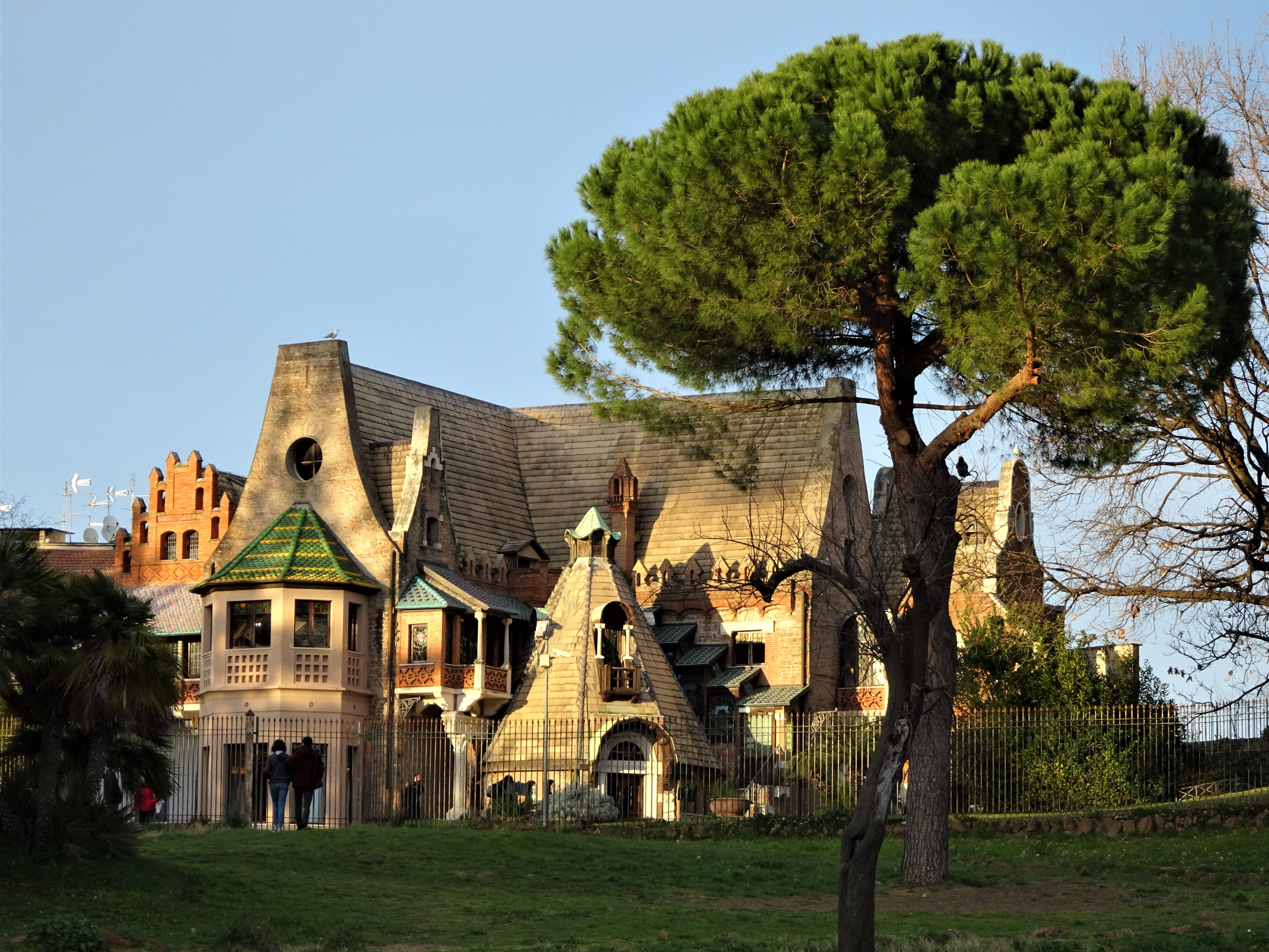 Casina delle Civette in het park van Villa Torlonia, Roma